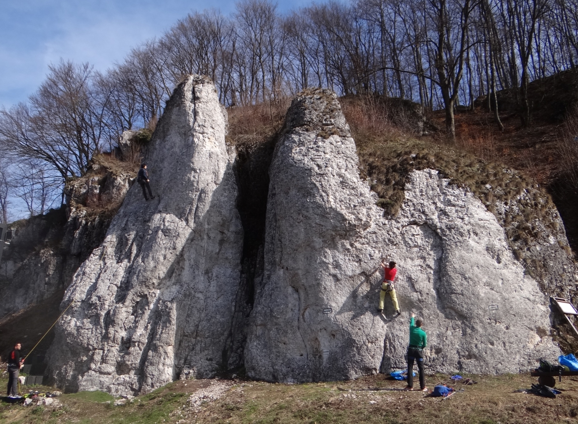 Skały Jupiter i Murawa w grupie skał nad Boiskiem w Dubiu